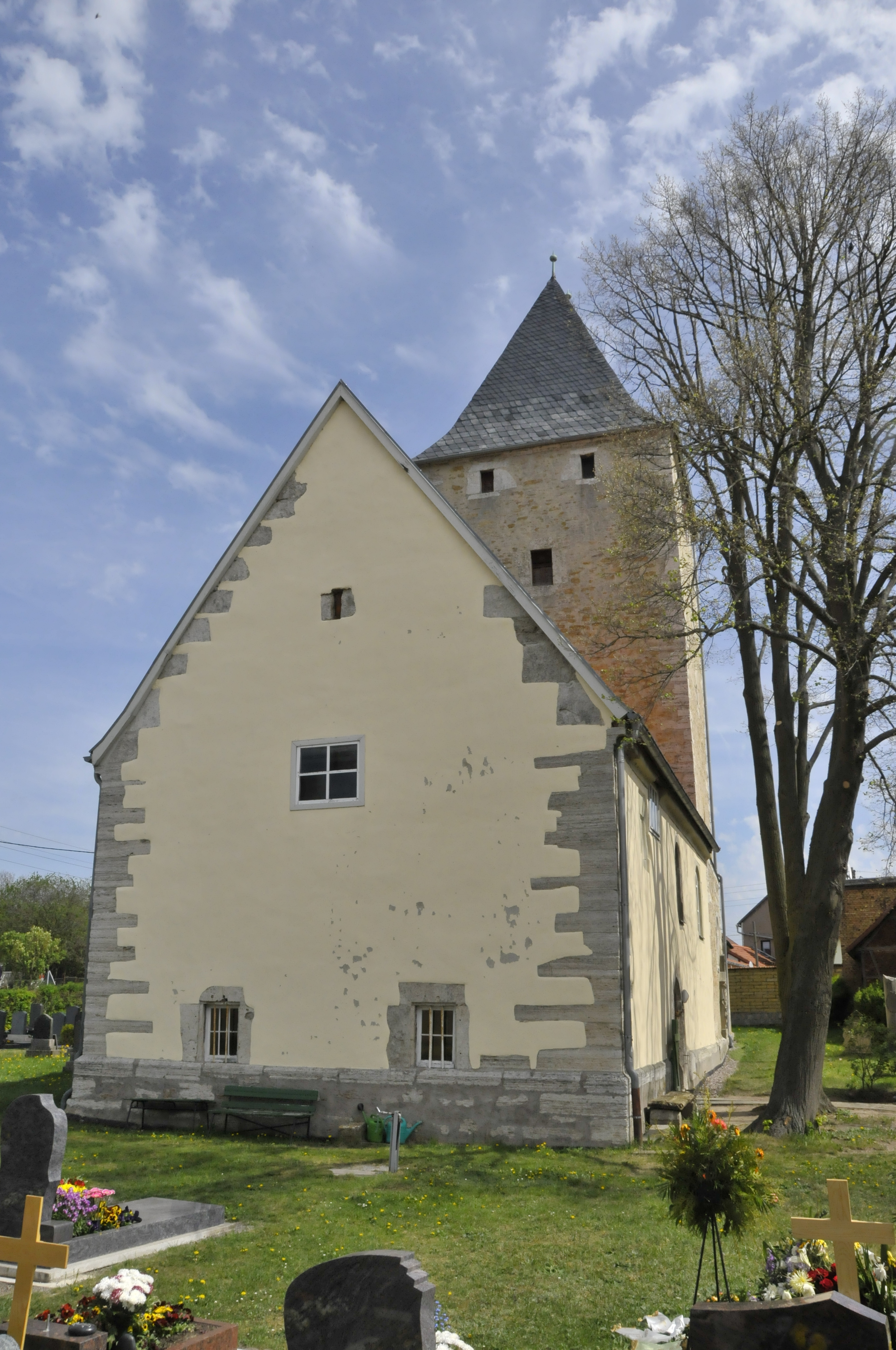 Großwelsbach, Kirche